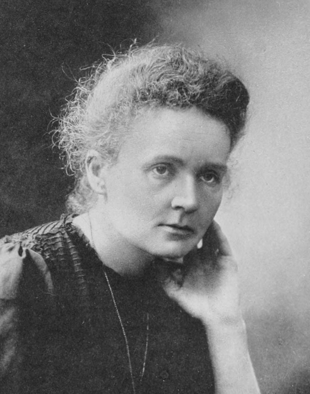 Marie Curie, cropped from File:Curie-nobel-portrait-2-600.jpg